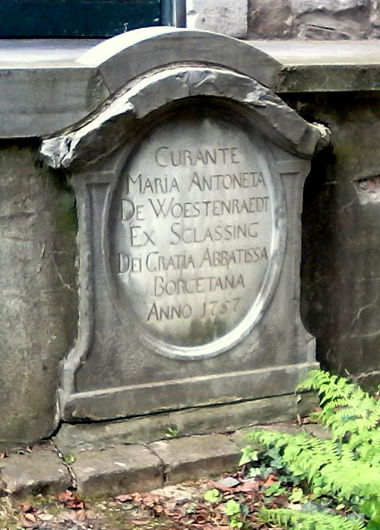 Grabstein der Äbtissin Marie Antoinette Woestenrath neben dem Eingang zur Grabkammer